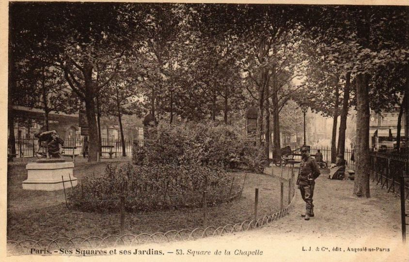 Paris.Square de la Chapelle.Intérieur